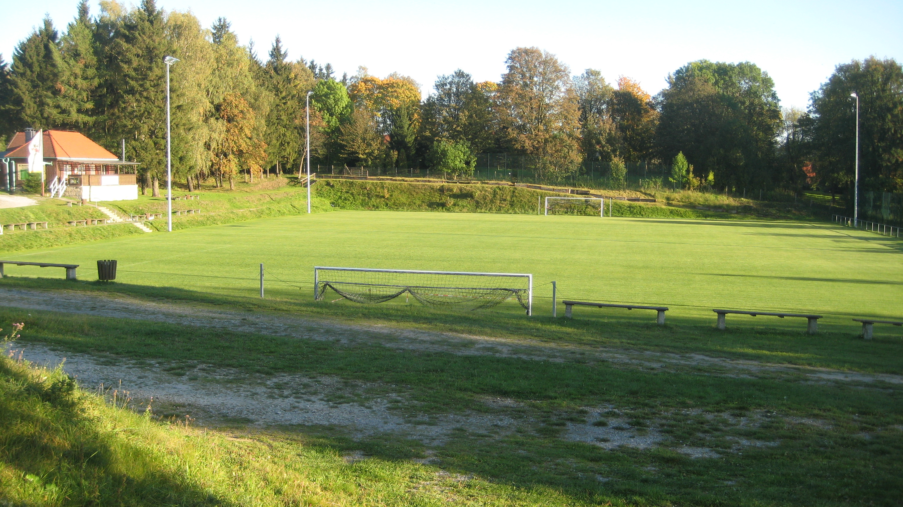 Benneckenstein voetbalveld (3)